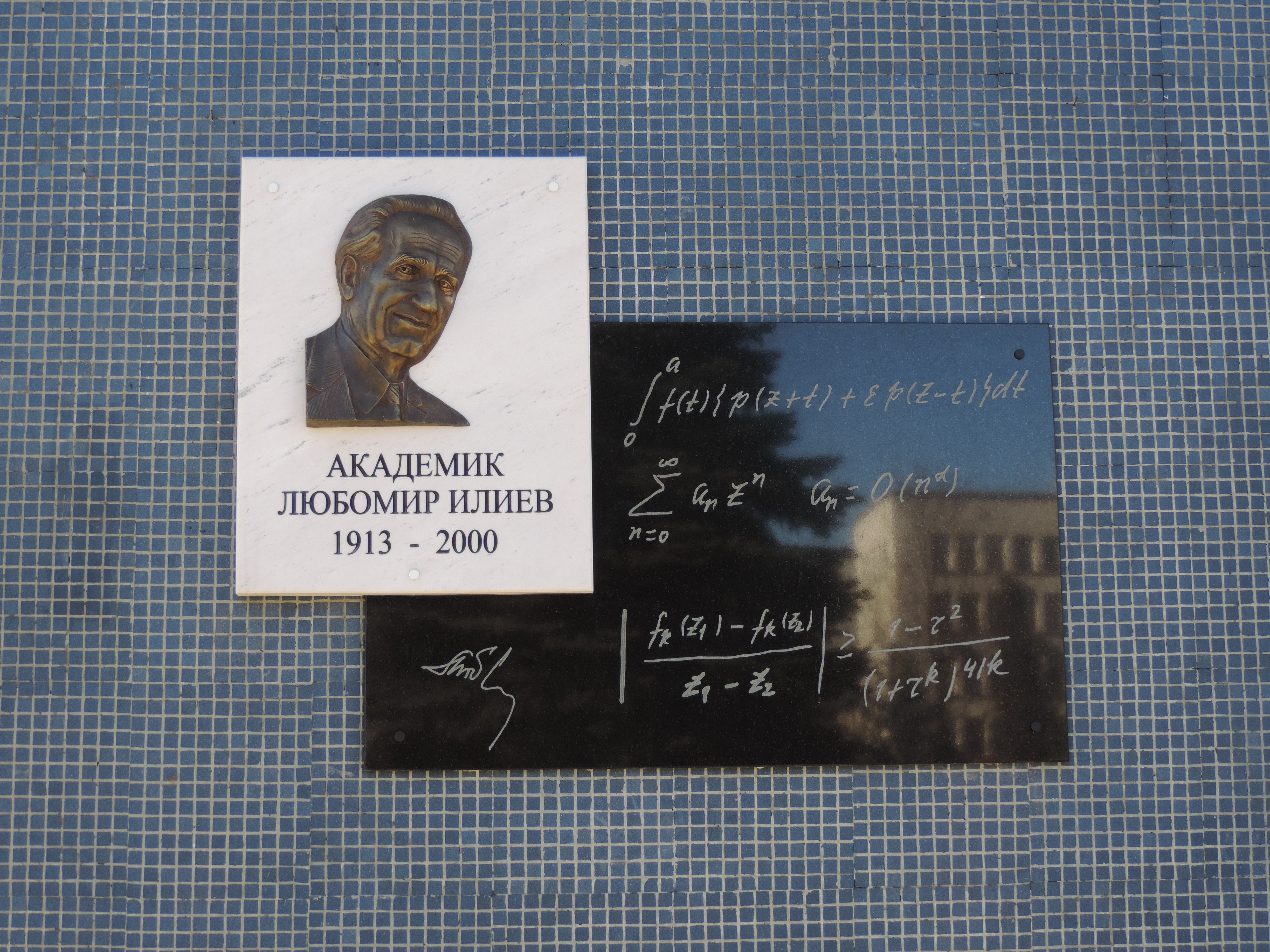 Паметна плоча в чест на акад. Любомир Илиев на входа на Института по математика и информатика към БАН, открита на 1 ноември 2013 г. Скулптор: Александър Хайтов, архитект: чл.-кор. Атанас Ковачев.